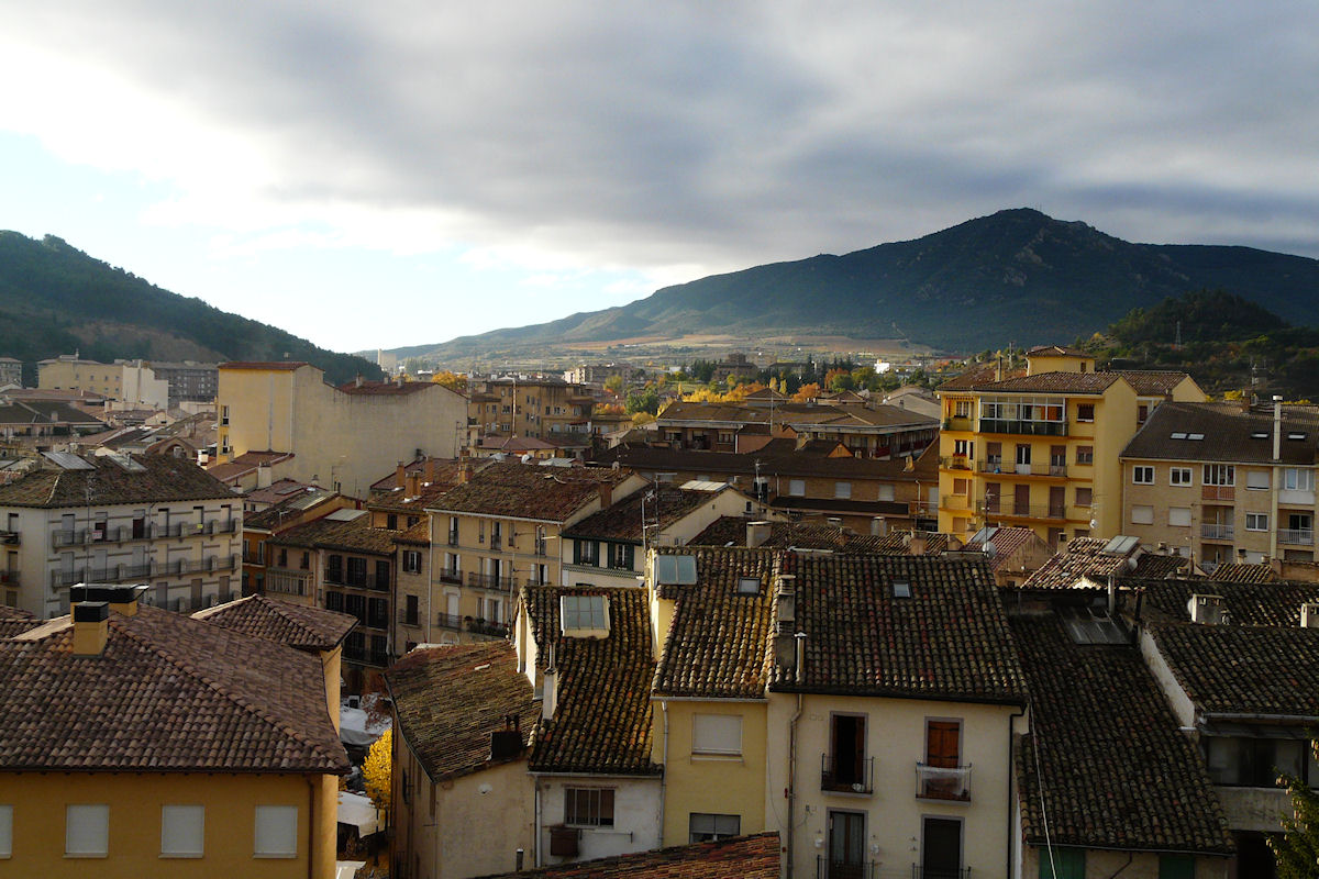 Estella, Navarre, Spain